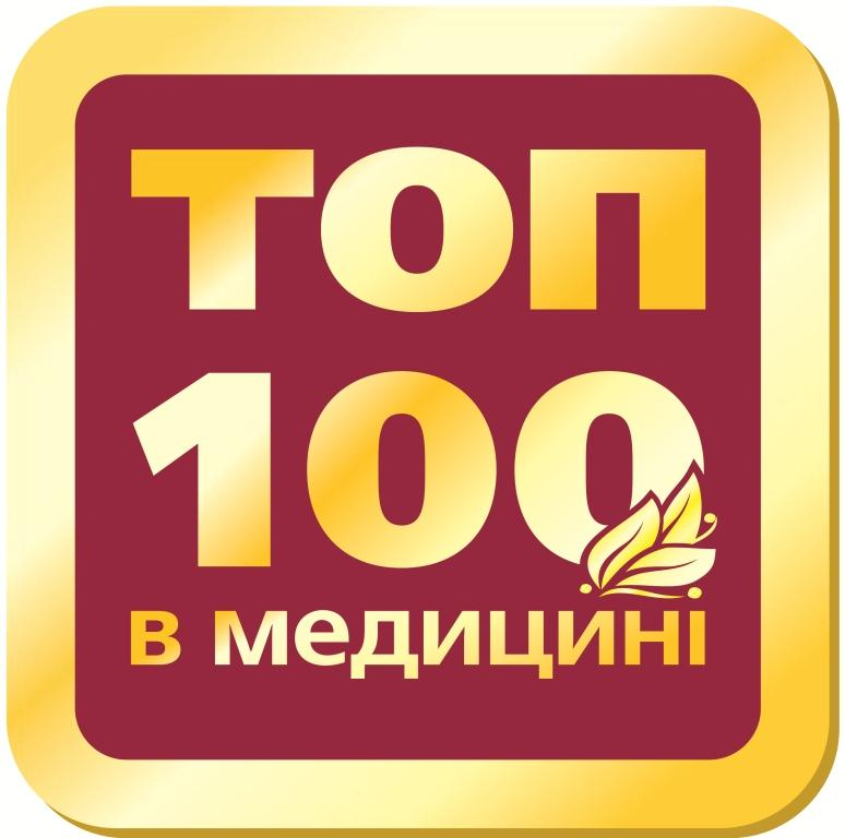 Логотип